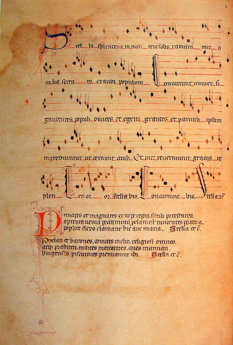 "Stella splendens" from the Llibre Vermell de Montserrat.